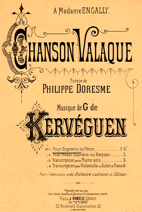 Chanson valaque, poésie de Philippe Doresme, musique du Vicomte Guy de Kervéguen (1857-1896) Éditions Julien Hamelle, 1891